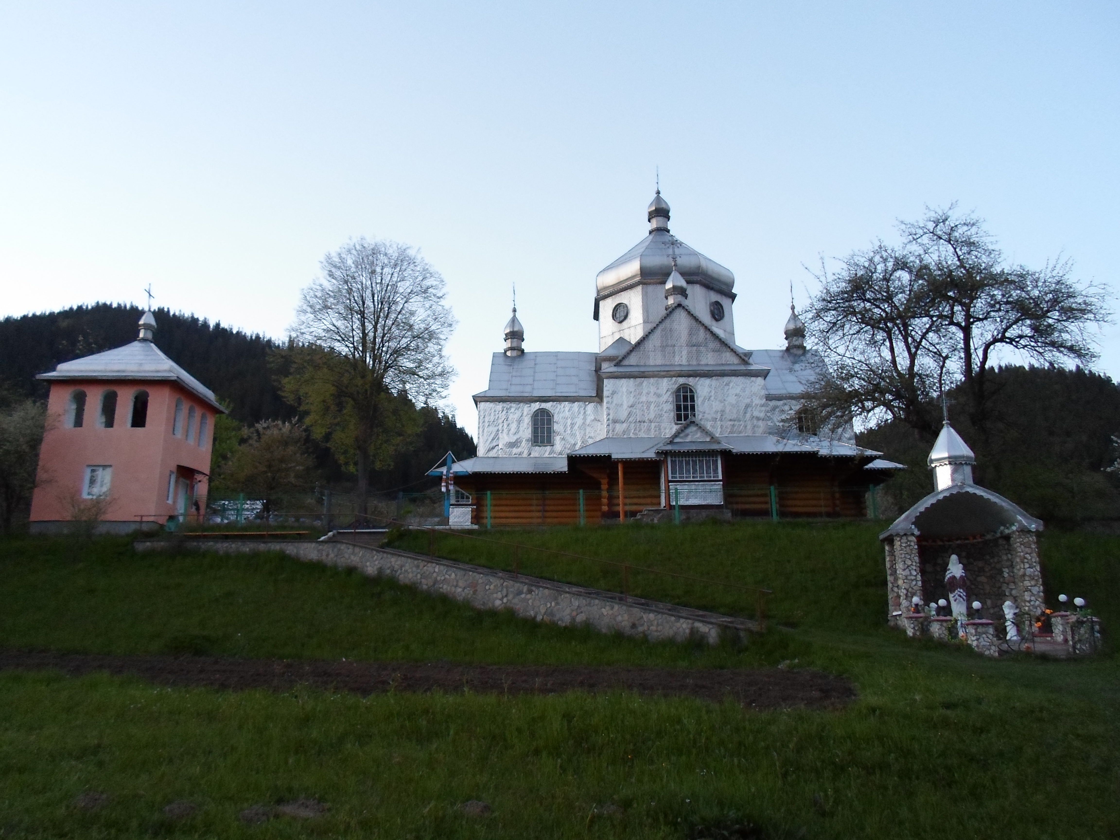 Вознесенська церква (дер.), с. Устеріки